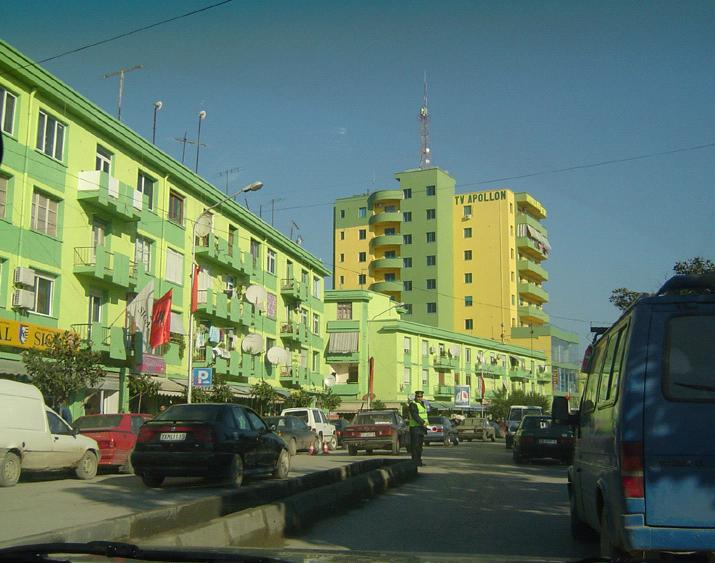 Im Stadtzentrum von Fier (Albanien), In the city center of Fier, Albania